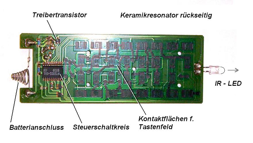 Infrarot-Fernbedienung, Innenaufbau des Handgerätes